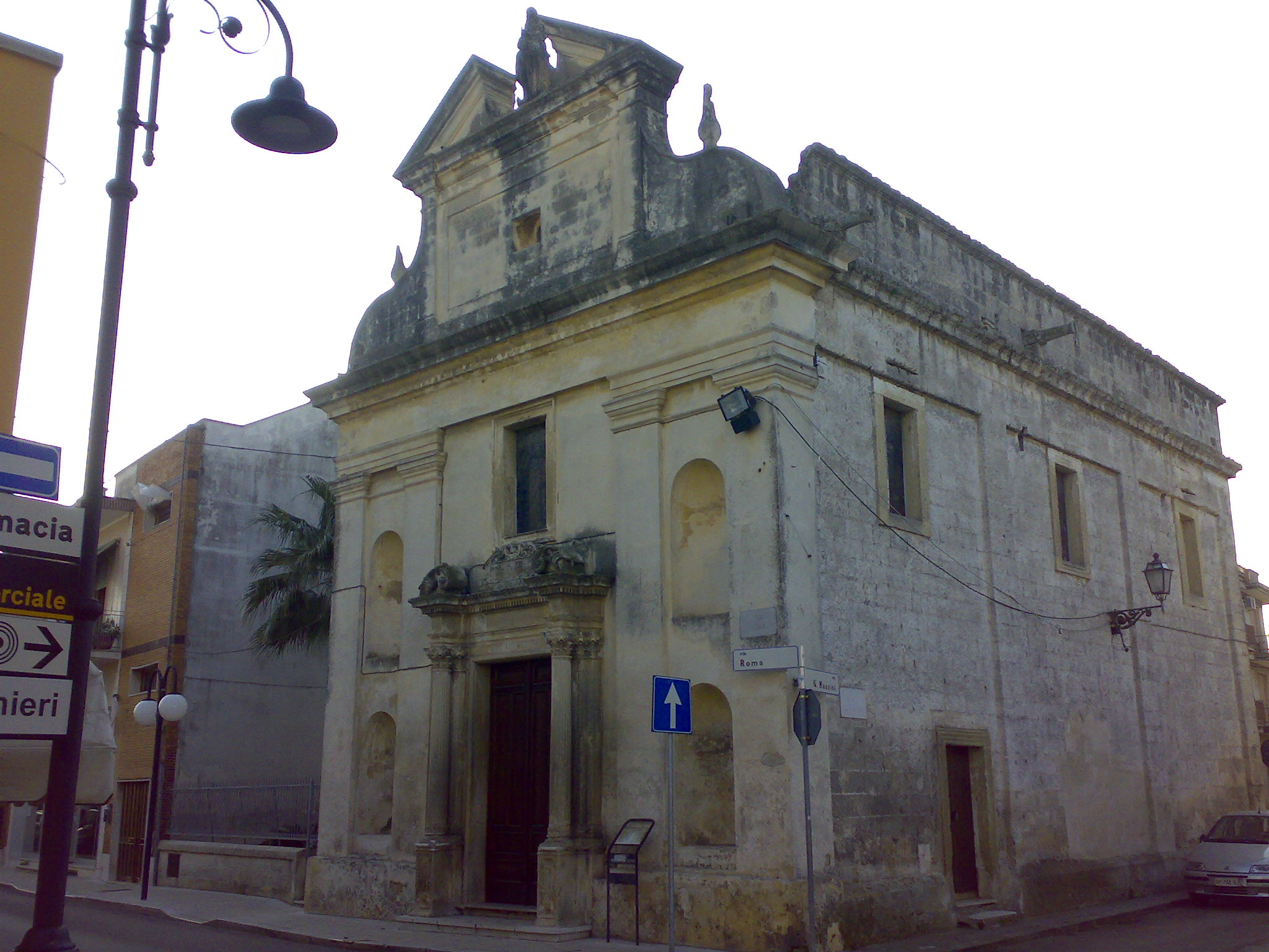 Chiesa dell'Immacolata Melendugno